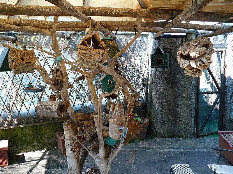 voliera de "I Giardini La Mortella" che ospita tante specie di uccellini fra cui molti pappagallini